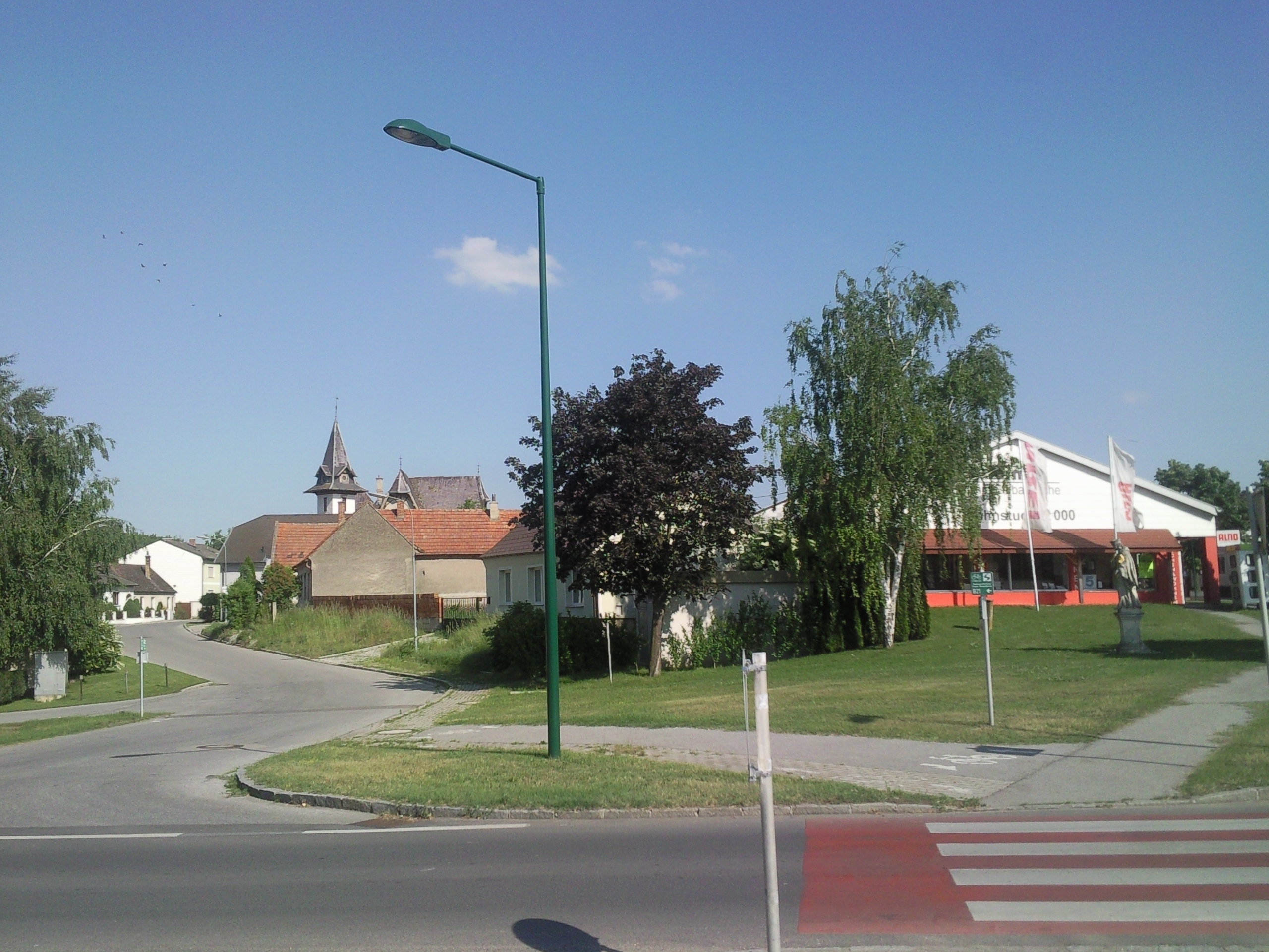 Gattendorf